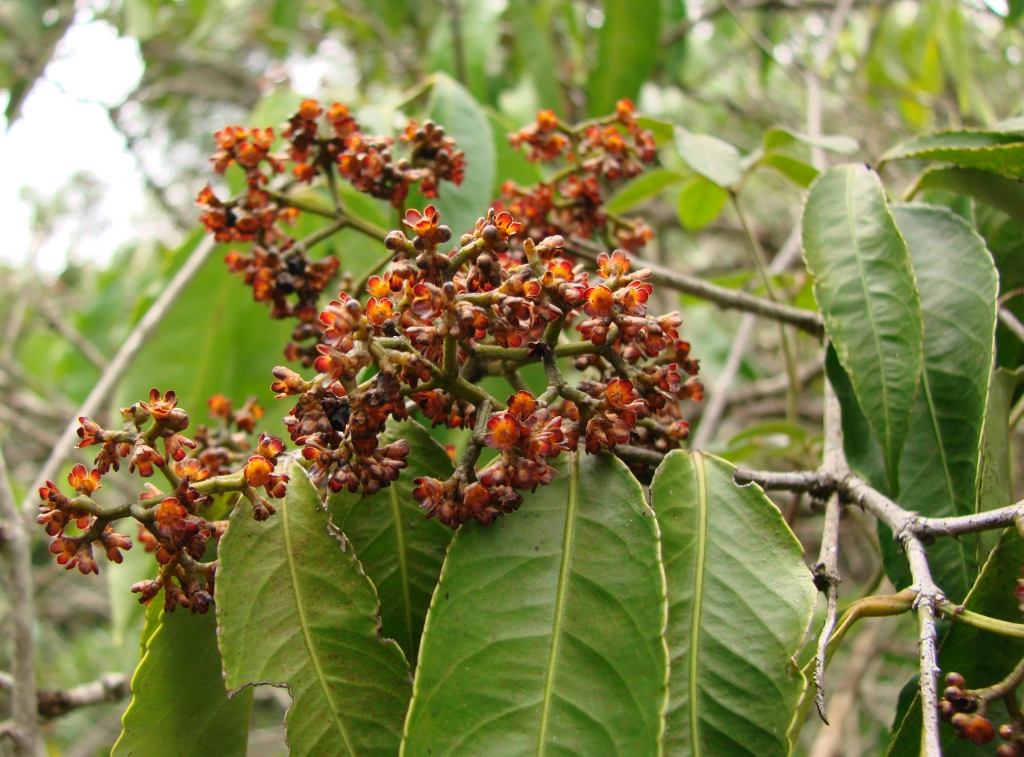 Cheiloclinium cognatum - CELASTRACEAE Jardim Botânico de Brasília - Distrito Federal - Brasil.